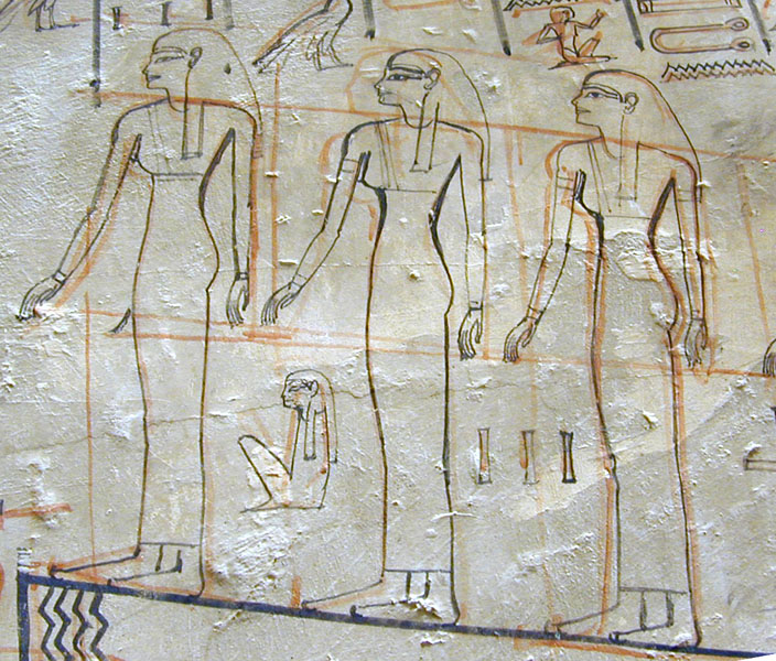 Exemples de dessins rectifiés et non terminés sur les murs de la tombe. Les esquisses sont en rouge et les dessins en noir. Séquences du Livre des Portes, l'un des plus importants recueils funéraires royaux du Nouvel Empire. Il apparait pour la première fois dans la tombe d'Horemheb.